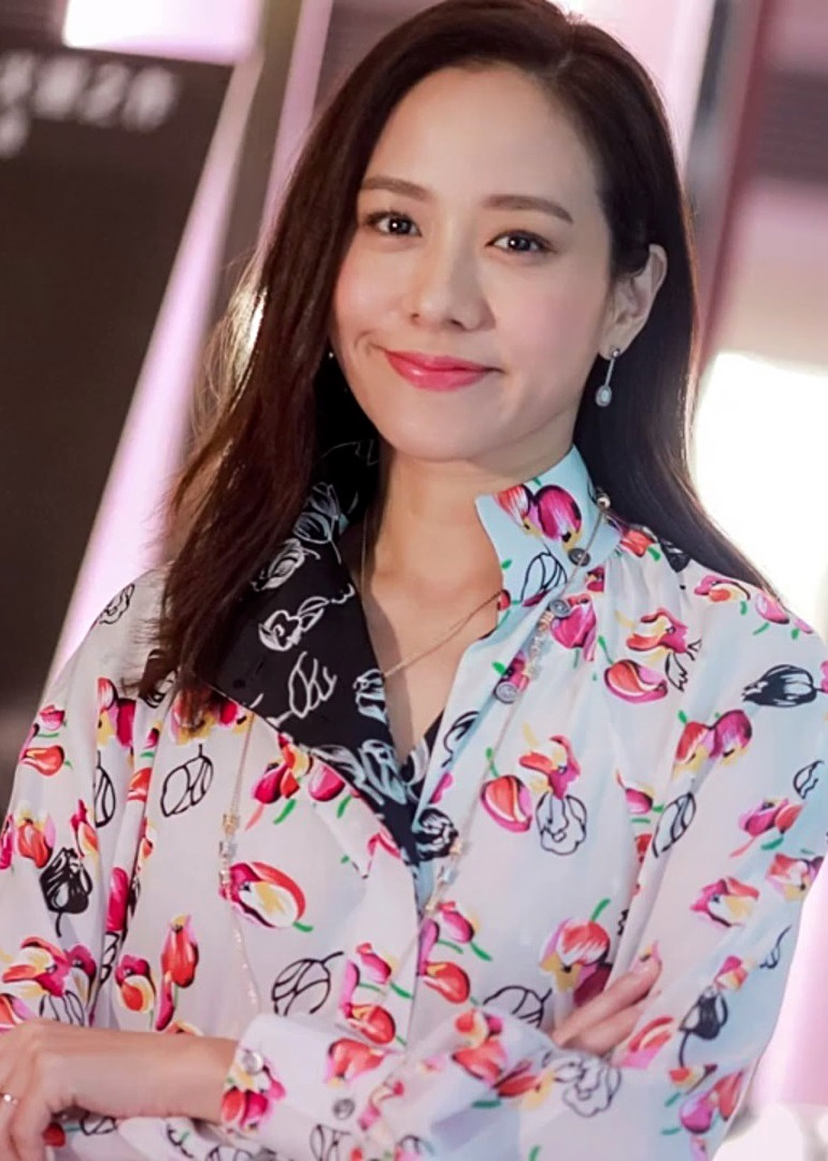 中文（香港）: 《am730》專訪